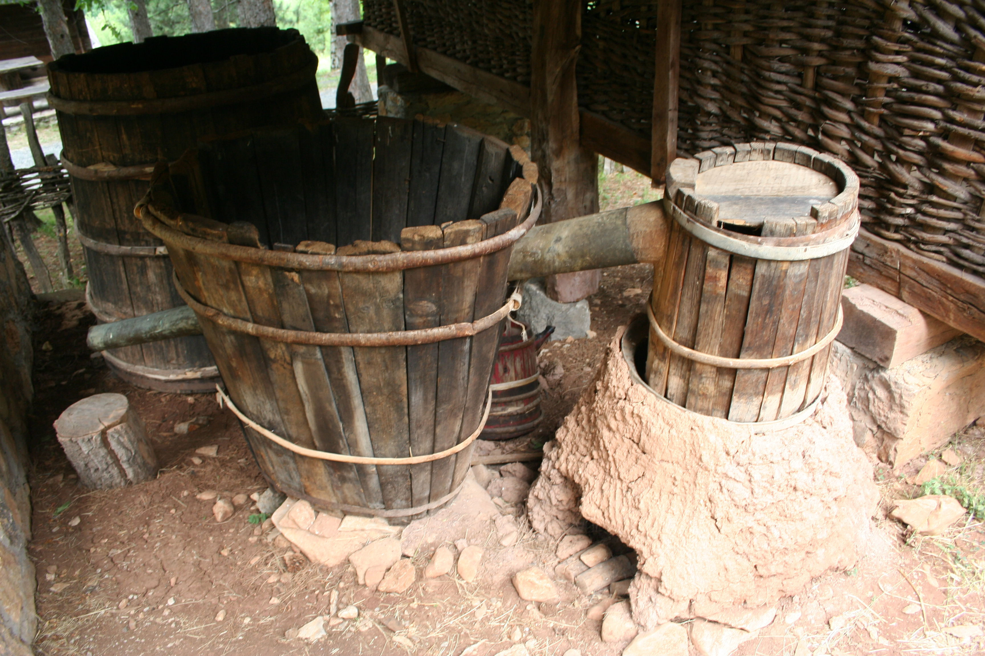 Muzej "Staro selo" Sirogojno